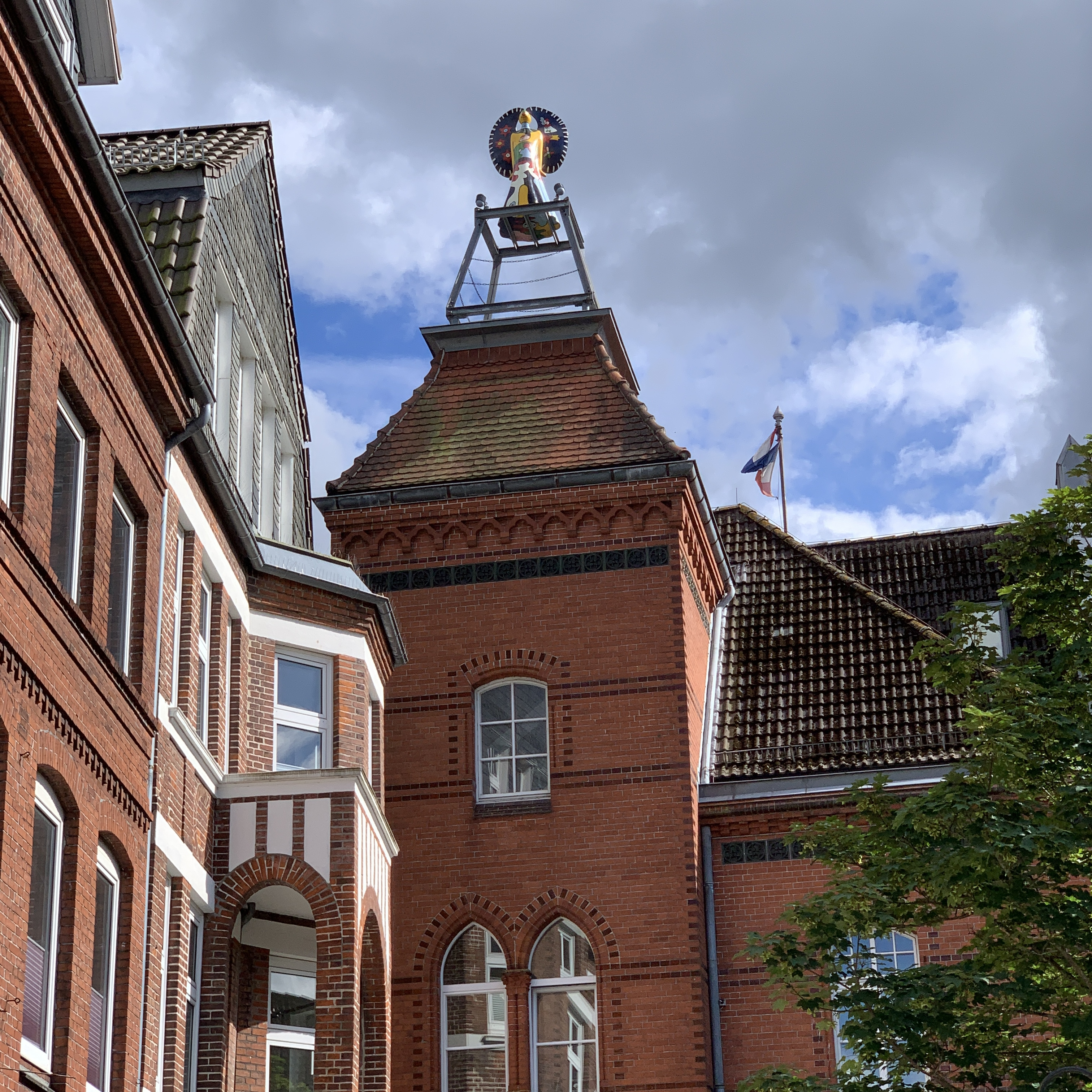 Eckernförde - alte Hauptpost mit Engel Nr. 2